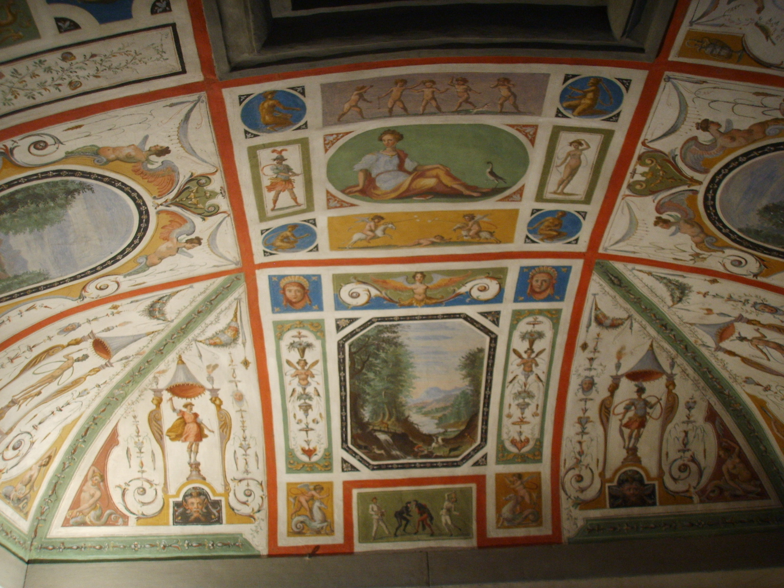 Villa il pozzino affresco grottesche